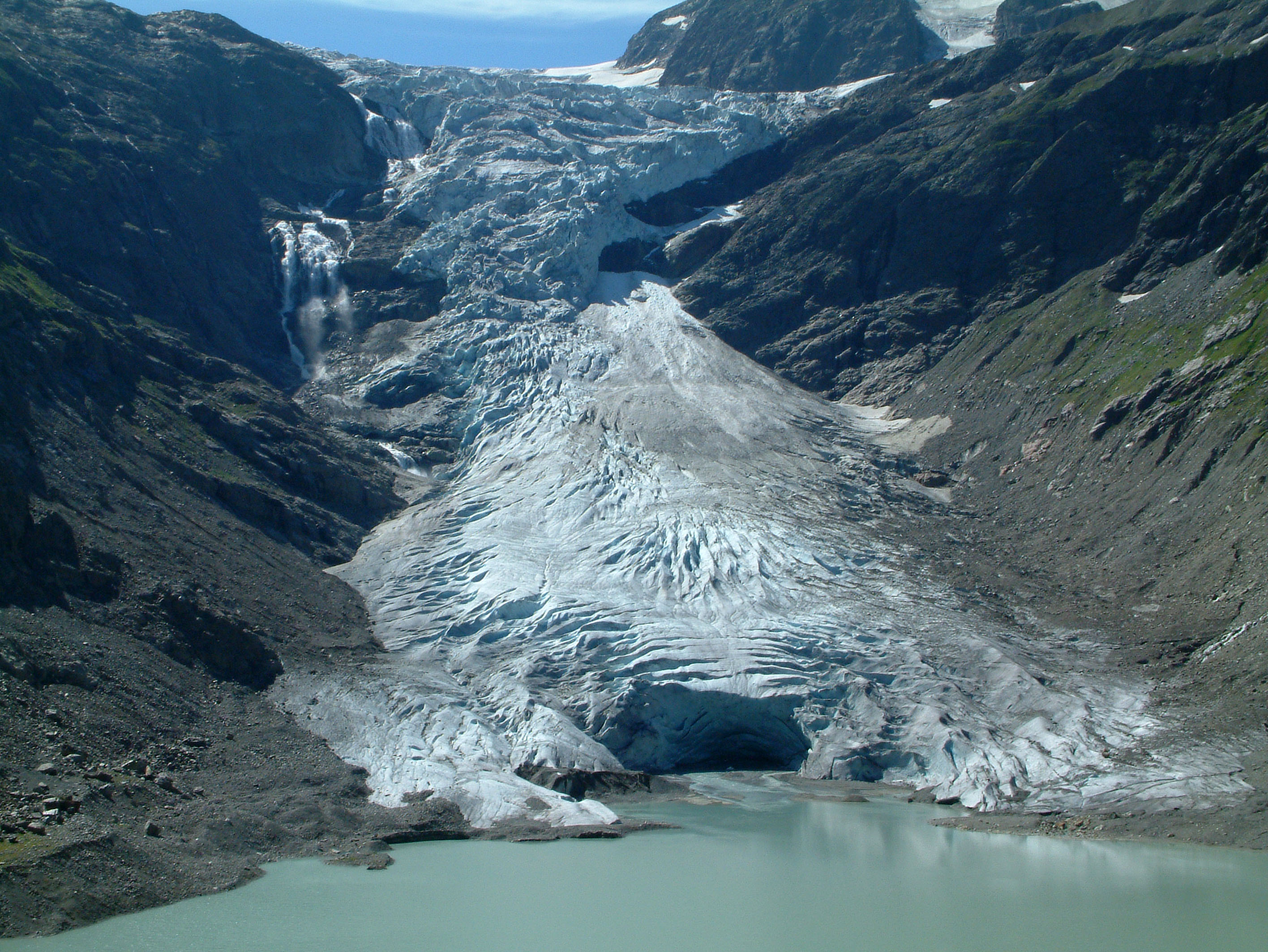 Unterer Abschnitt des Triftgletschers, Schweiz